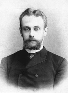 Барон Владимир Владимирович Меллер-Закомельский, член Государственного Совета по выборам.